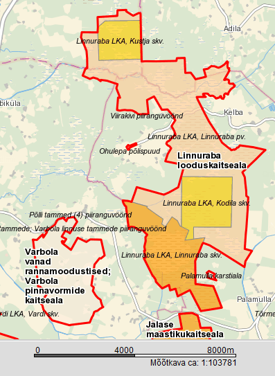 Linnuraba LKA ja Vambola pinnavormide kaitseala paiknemine kaardil. Põhineb Maa-ameti kaardil.